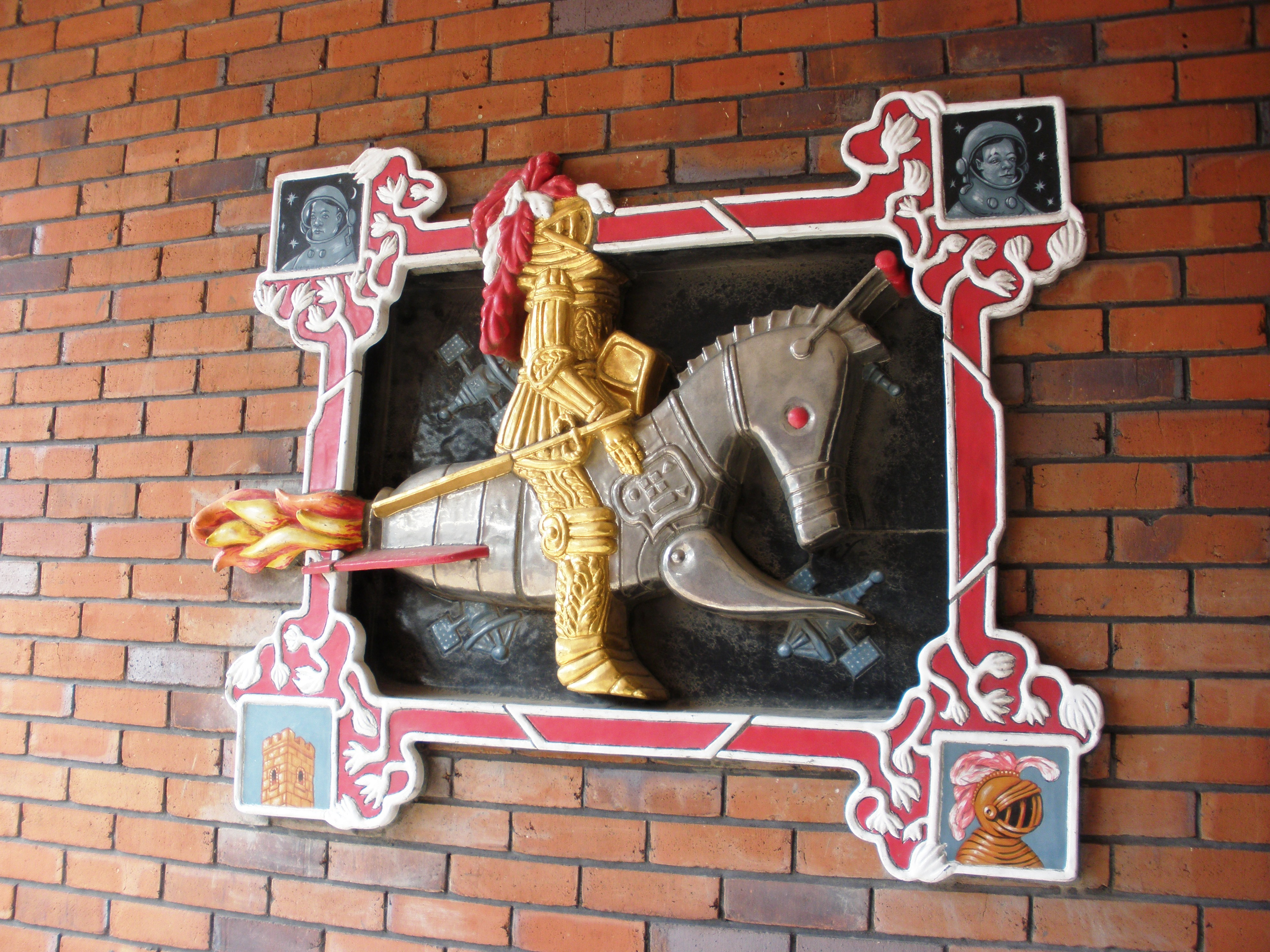 Kunstwerk De ruimteridder van Woerden van Pepijn van den Nieuwendijk in Woerden.